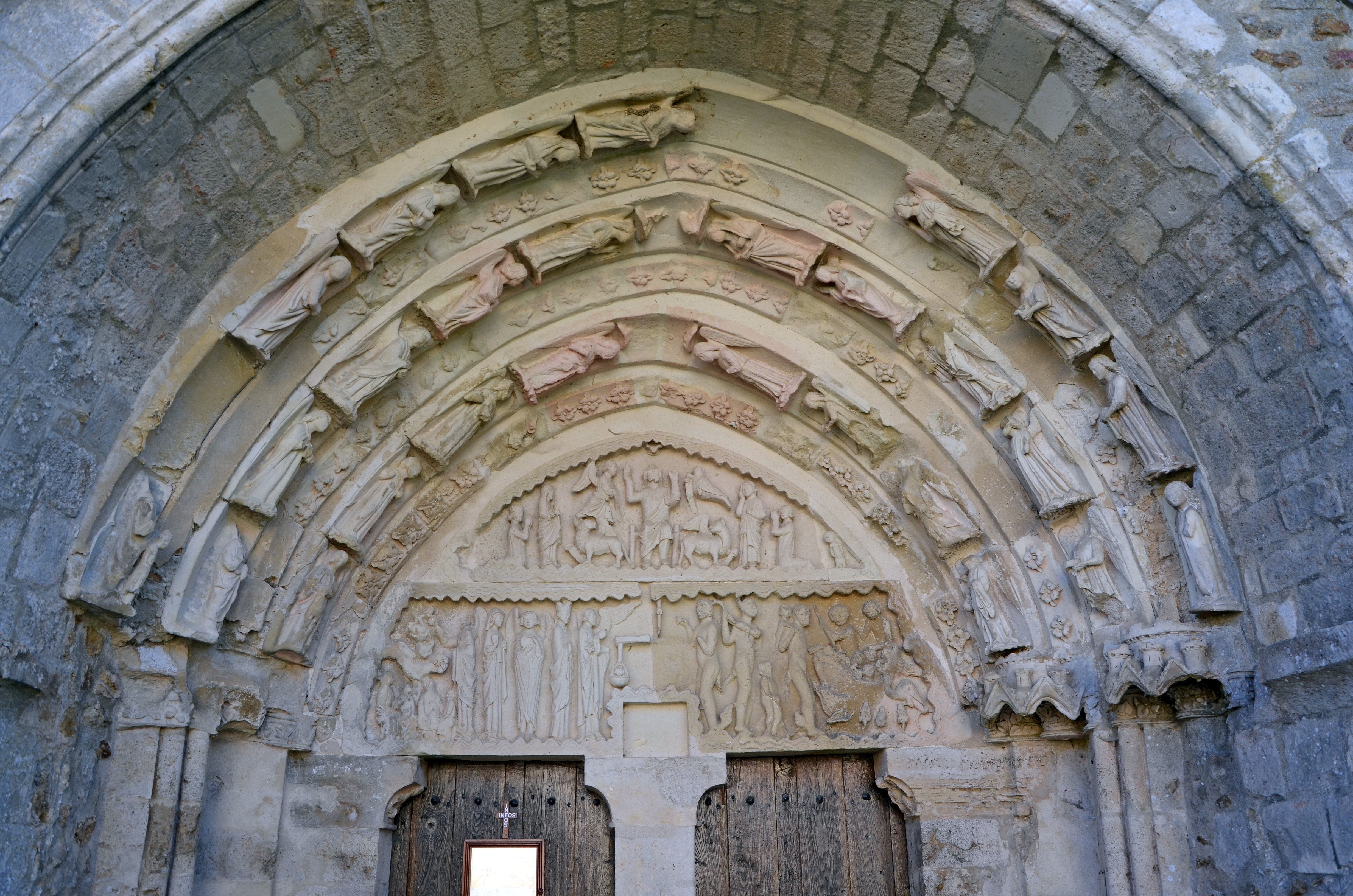 Tympan de l'église Saint-Eugene, Aisne, Picardie, France